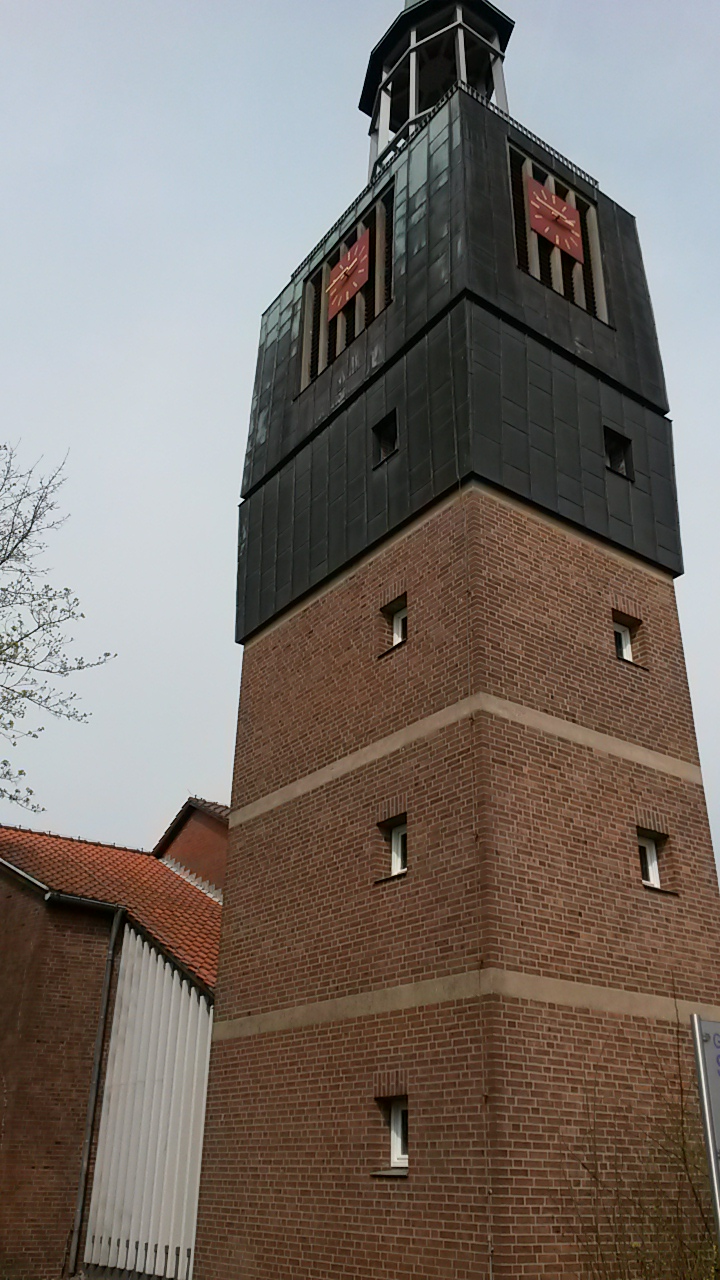 Kirchturm mit der Uhr